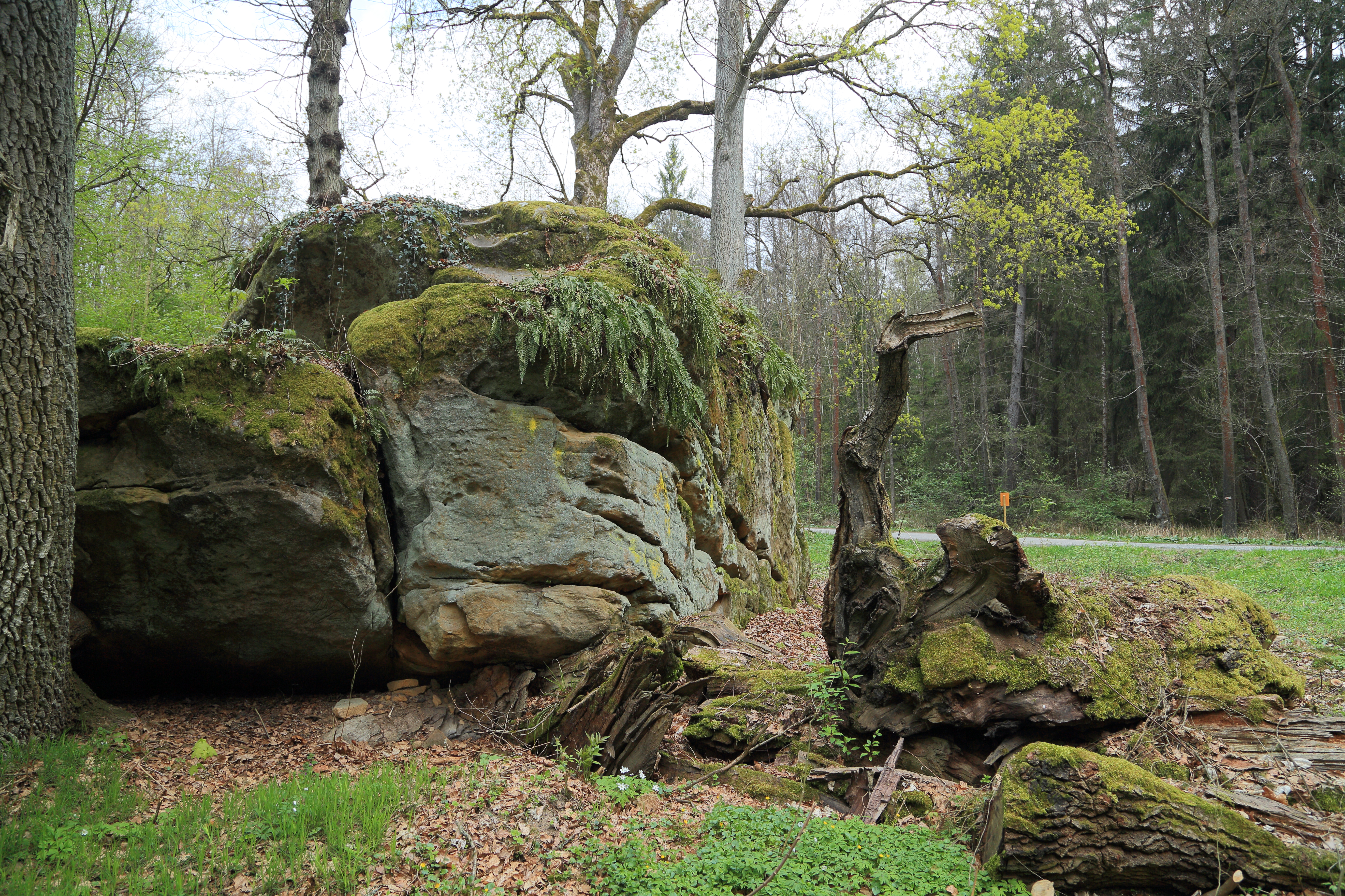 Katzenstein SE von Eckersdorf Geotop-Nummer: 472R028 6035GT000012 Eckersdorf Bayreuth 6035 Bayreuth R: 4465433 H: 5532634 360 m ü.NN L: 12 m, B: 6 m, H: 10 m, F: 72 qm Obermain-Bruchschollenland Der Lias Alpha 1 und 2 Sandsteinblock wurde durch natürliche Verwitterung aus den weichen Sandsteinlagen herauspräpariert. Geotoptyp:Felsburg